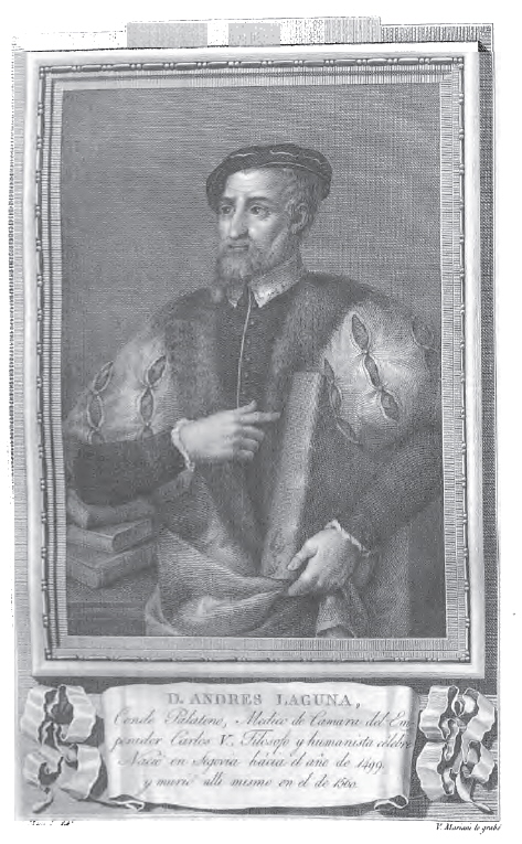 Retrato de Andrés Laguna.